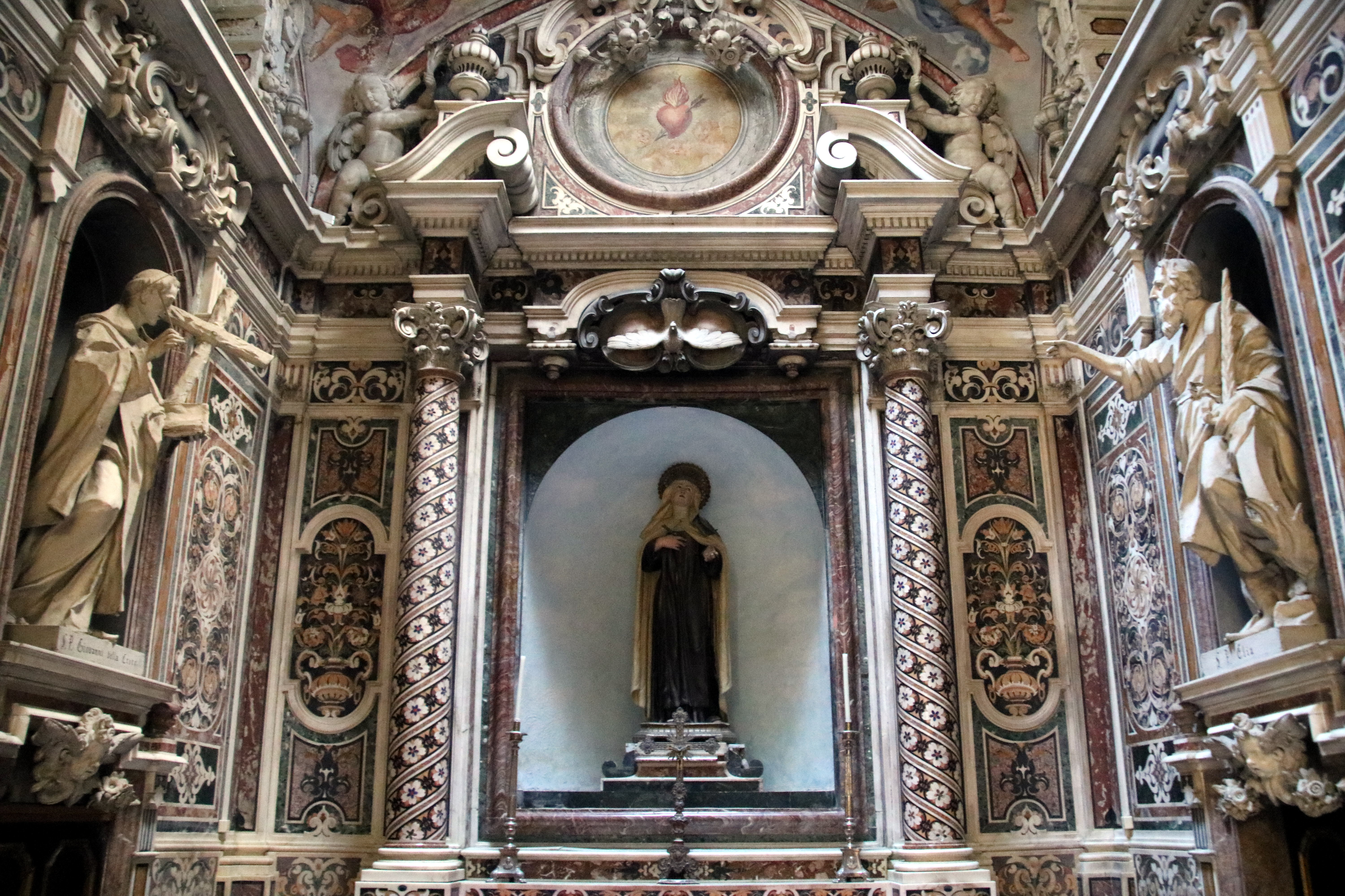 Cappella di Santa Teresa d'Avila progettato da Cosimo Fanzago, 1640, chiesa di Santa Teresa degli Scalzi (Napoli)